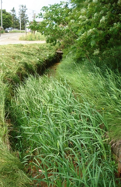 北海道・札幌市南区・清田区・厚別区・白石区・江別市を流れる厚別川。川下公園付近の旧河道。